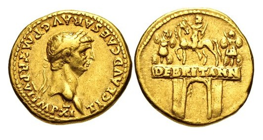 Claudius. AD 41-54.AV Aureus (19mm, 7.78 g, 5h). Rome mint. Struck AD 46-47.Laureate head rightEquestrian statue left on triumphal arch with architrave inscribed DE BRITANN; trophy to left and right.RIC I 33; von Kaenel type 27; Calicó 349.